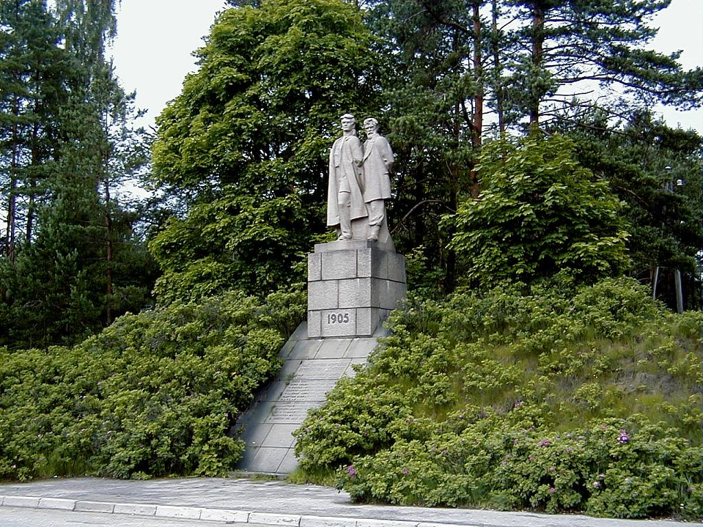 Ulbroka, 1905. g. revolūcijas piemineklis 2000-07-02